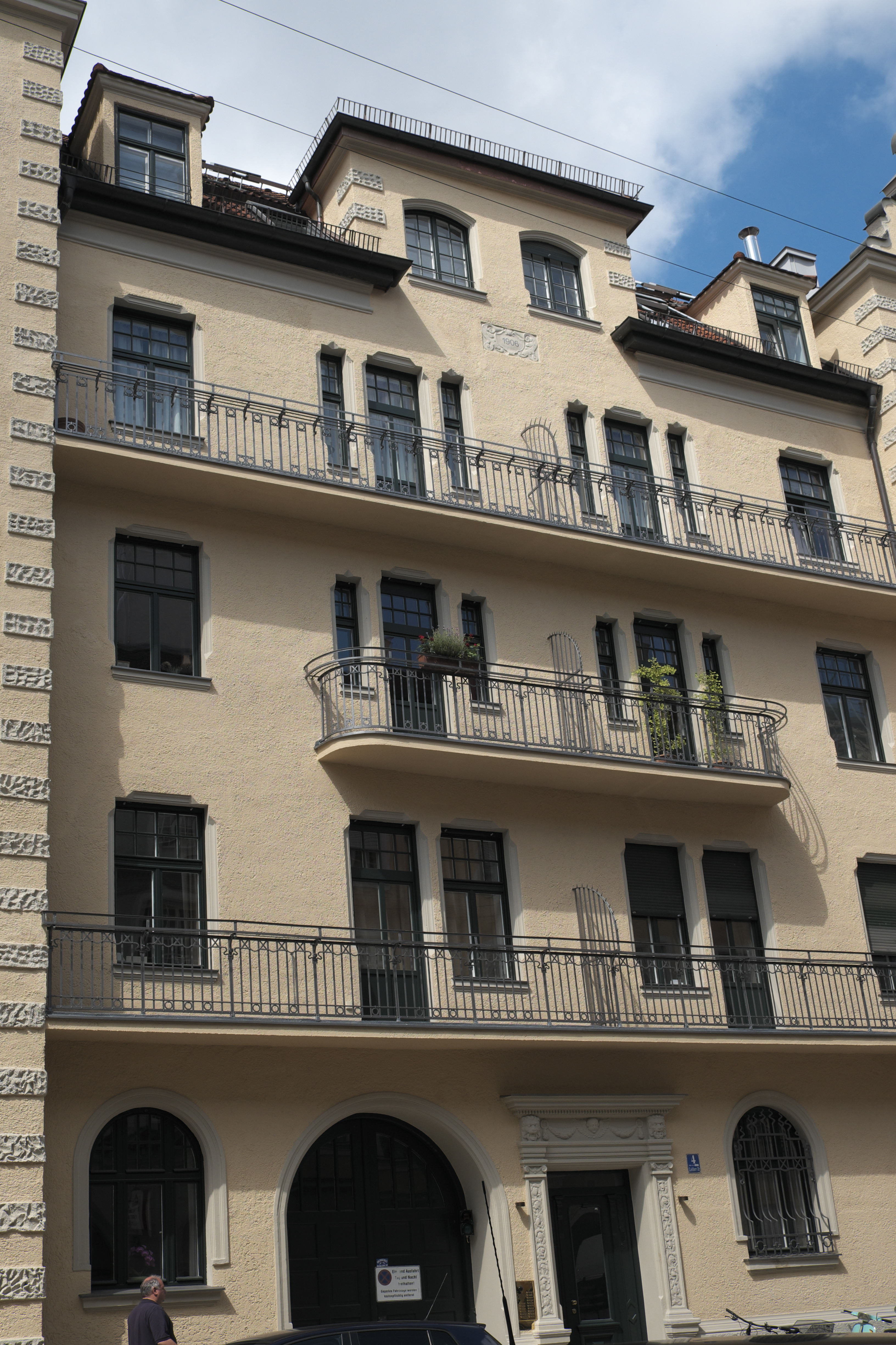 Mietshaus in der Liebherrstraße 4 im Lehel im Stadtbezirk Altstadt-Lehel in München (Bayern/Deutschland), 1905–06 von Konrad Böhm nach Entwurf von Adolf Wentzel gebaut